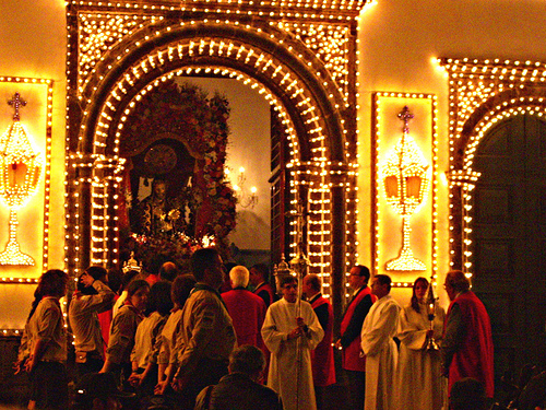 ..a caminho de Igreja de São Jose